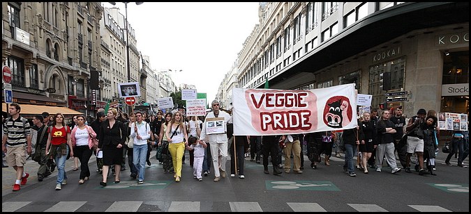 Photo de la Veggie Pride de Paris